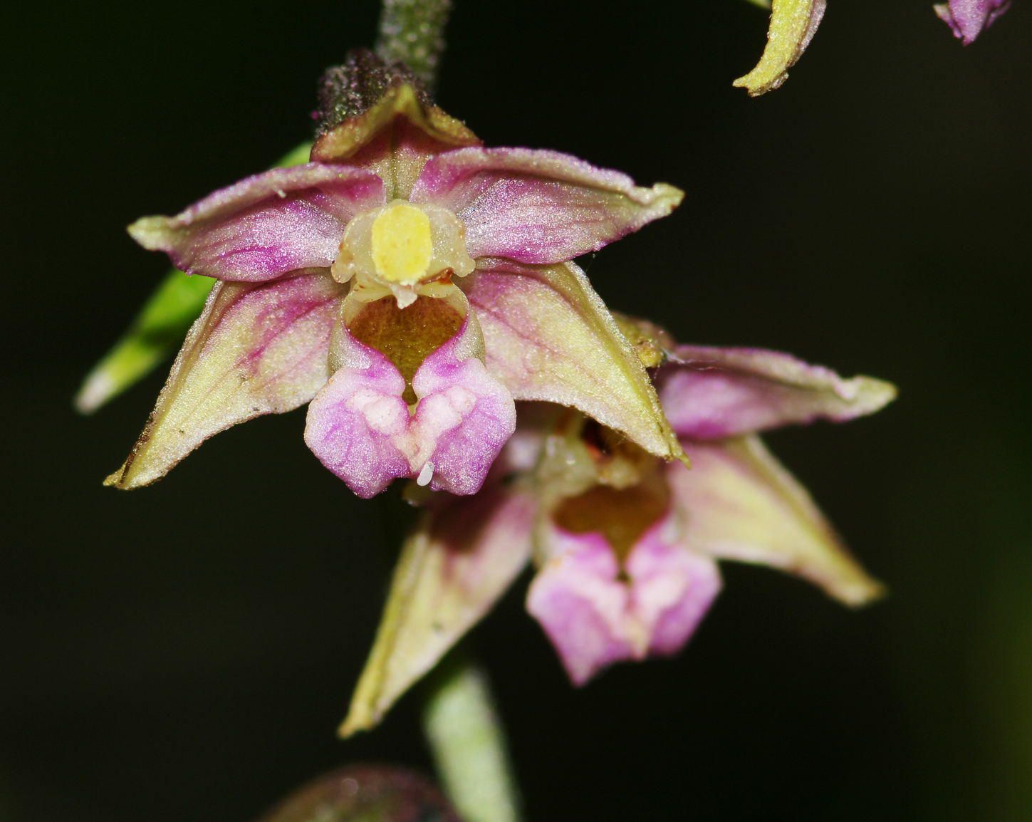 Kruszczyk szerokolistny (Epipactis helleborine) Kuźnica Warężyńska w Dąbrowie Górniczej